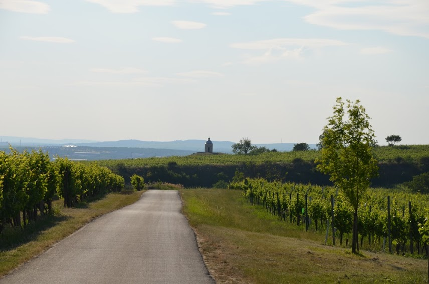 Velké Bílovice, kaple sv. Urbana, Václava, Cyrila a Metoděje